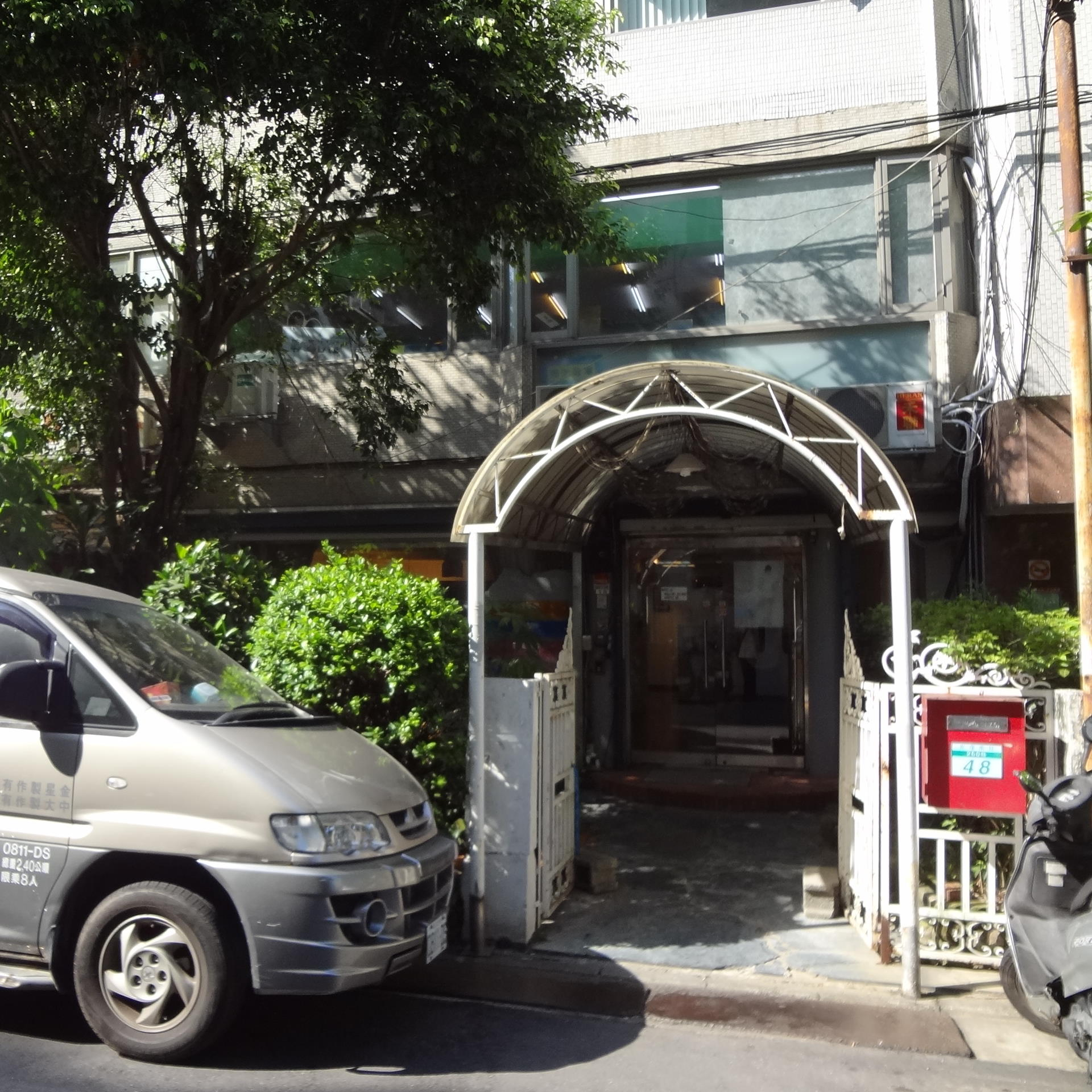 中文（台灣）: 金星娛樂總部，位於臺北市大安區光復南路260巷48號1樓，也是原福隆製作公司總部。